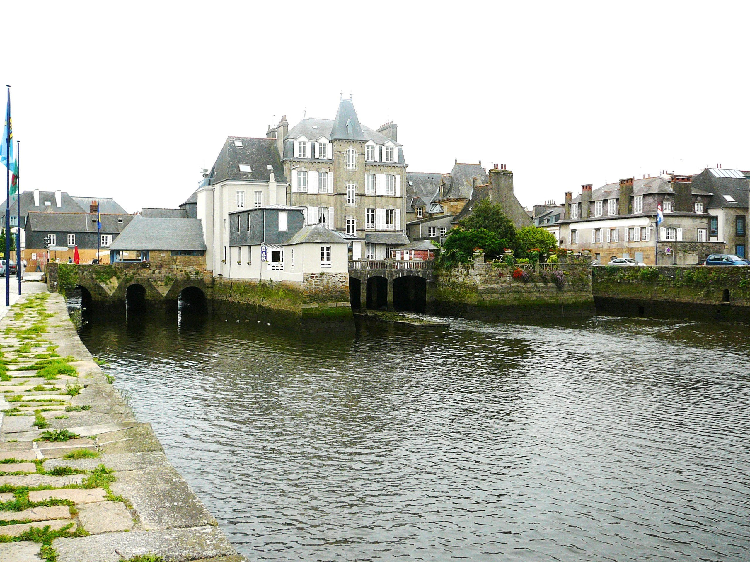 Landerneau : le pont habité sur l'Elorn (pont Rohan) vu de l'aval